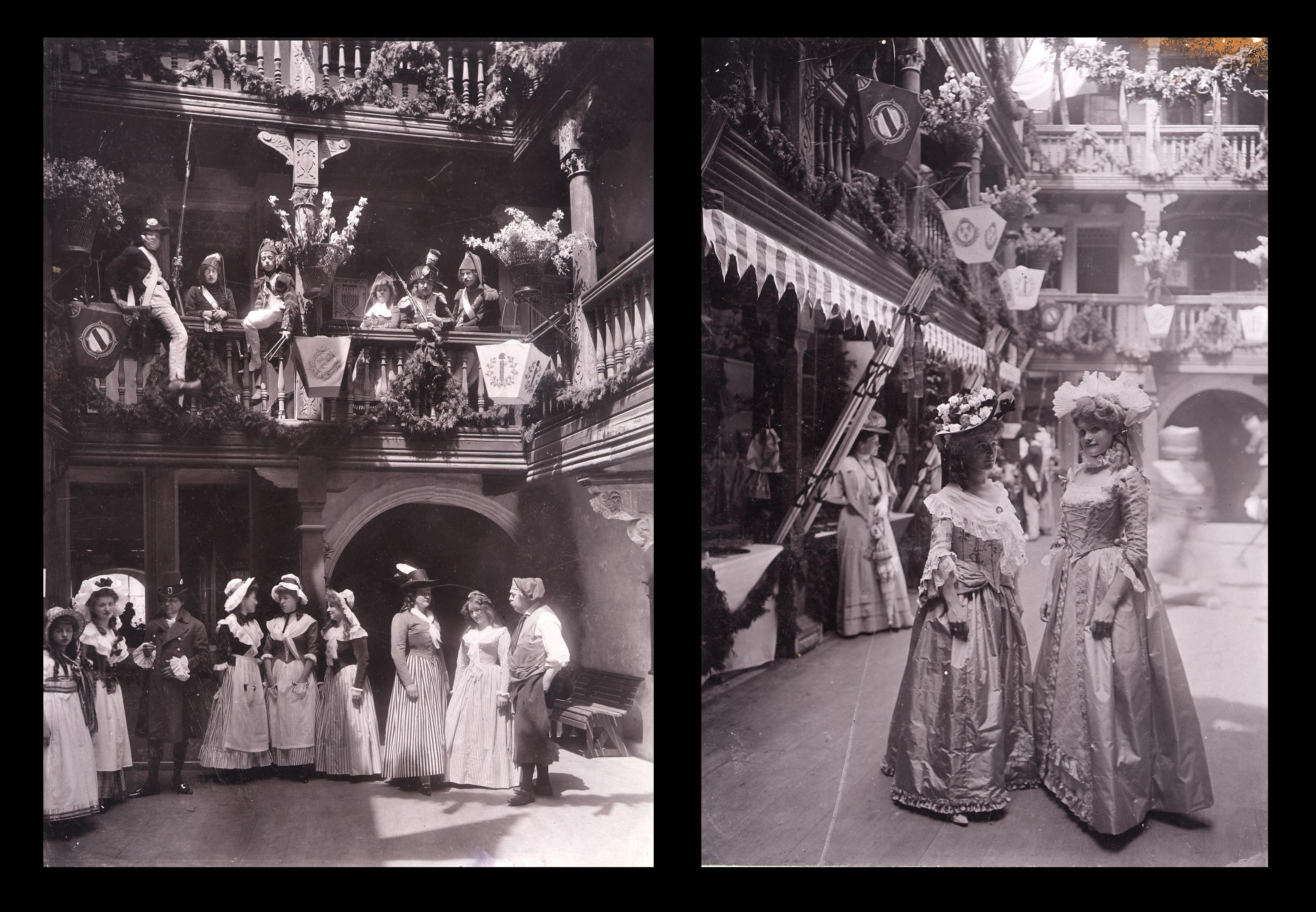 Kermesse organisée à l'issue de l'inauguration du Musée Alsacien